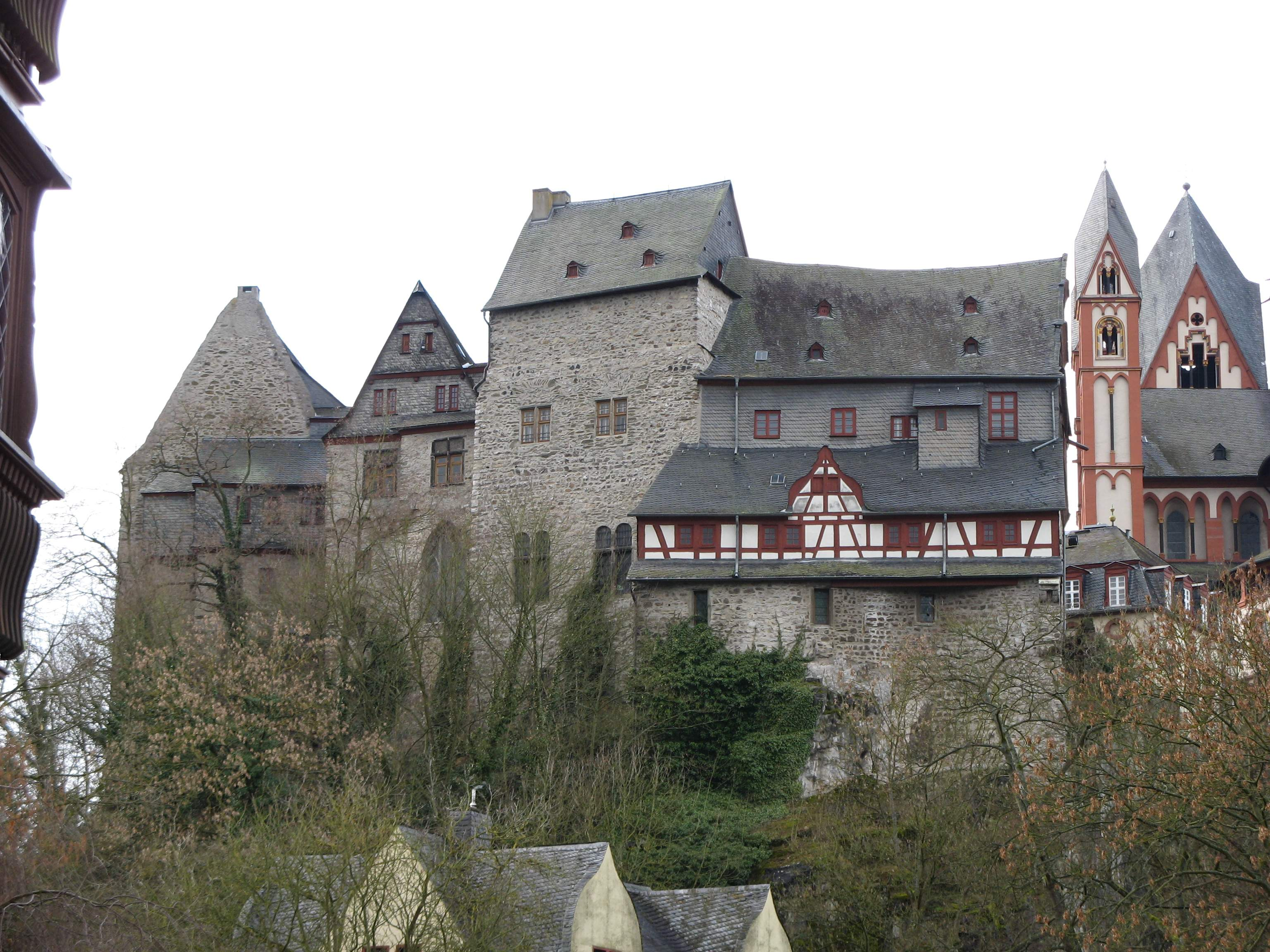 Rückansicht des Schloss Limburg von der Lahn aus. Am rechten Bildrand ist der Dom zu erkennen.